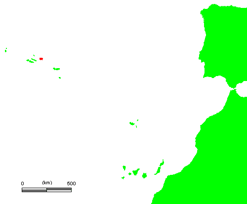 PT Terceira.PNG